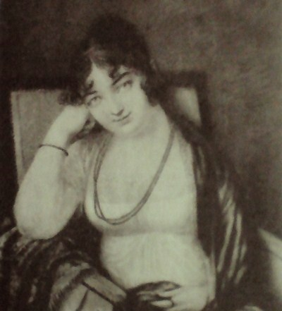 Варвара Петровна Шереметева, ур. Алмазова (1786—1857)